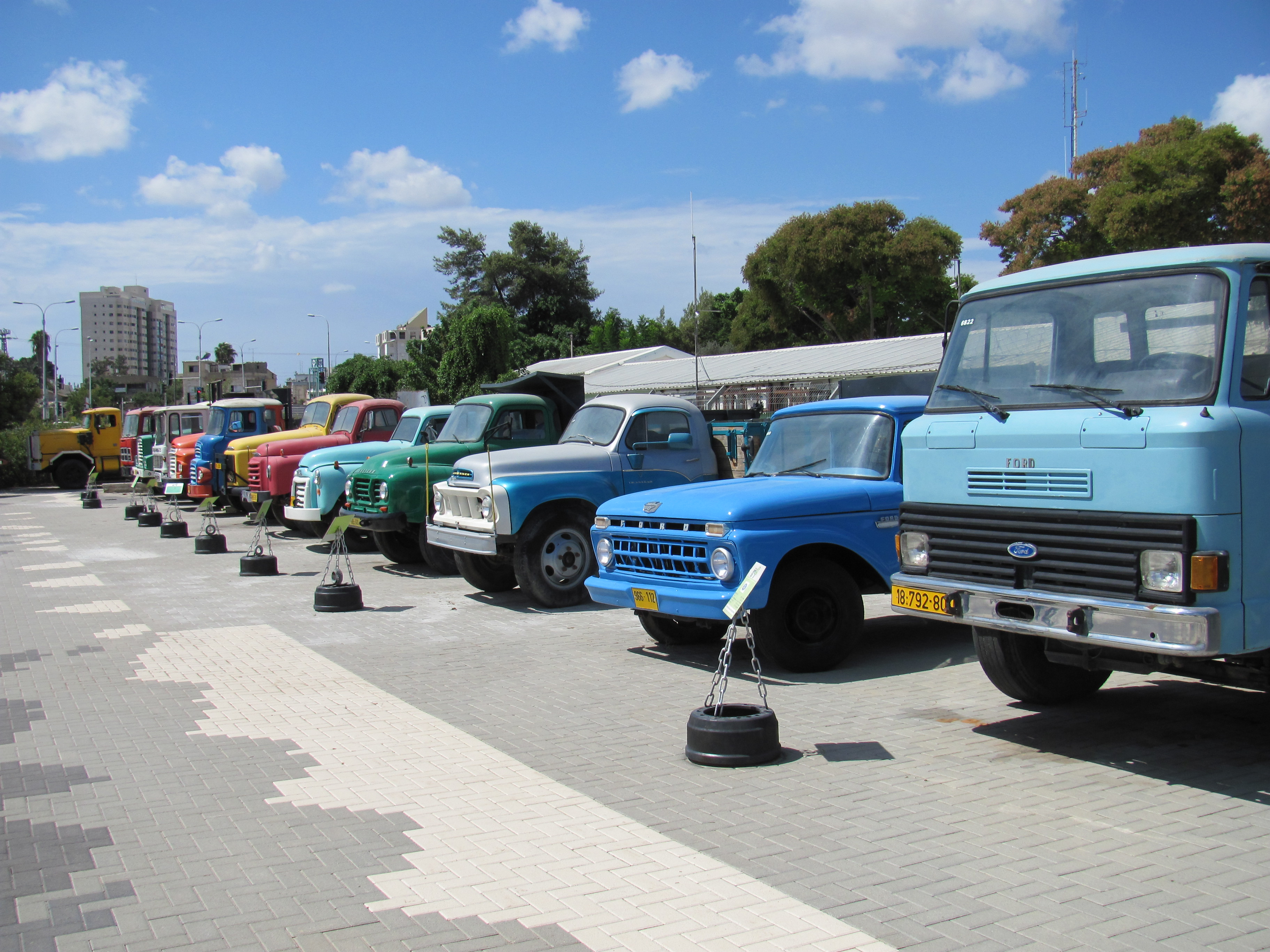 מוצג במוזאון המשאיות ברמלה